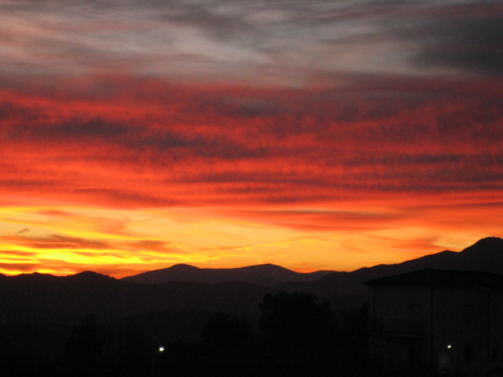 Entre chien et loup sur la Sierra de la Peña de Francia (Salamanca — España)